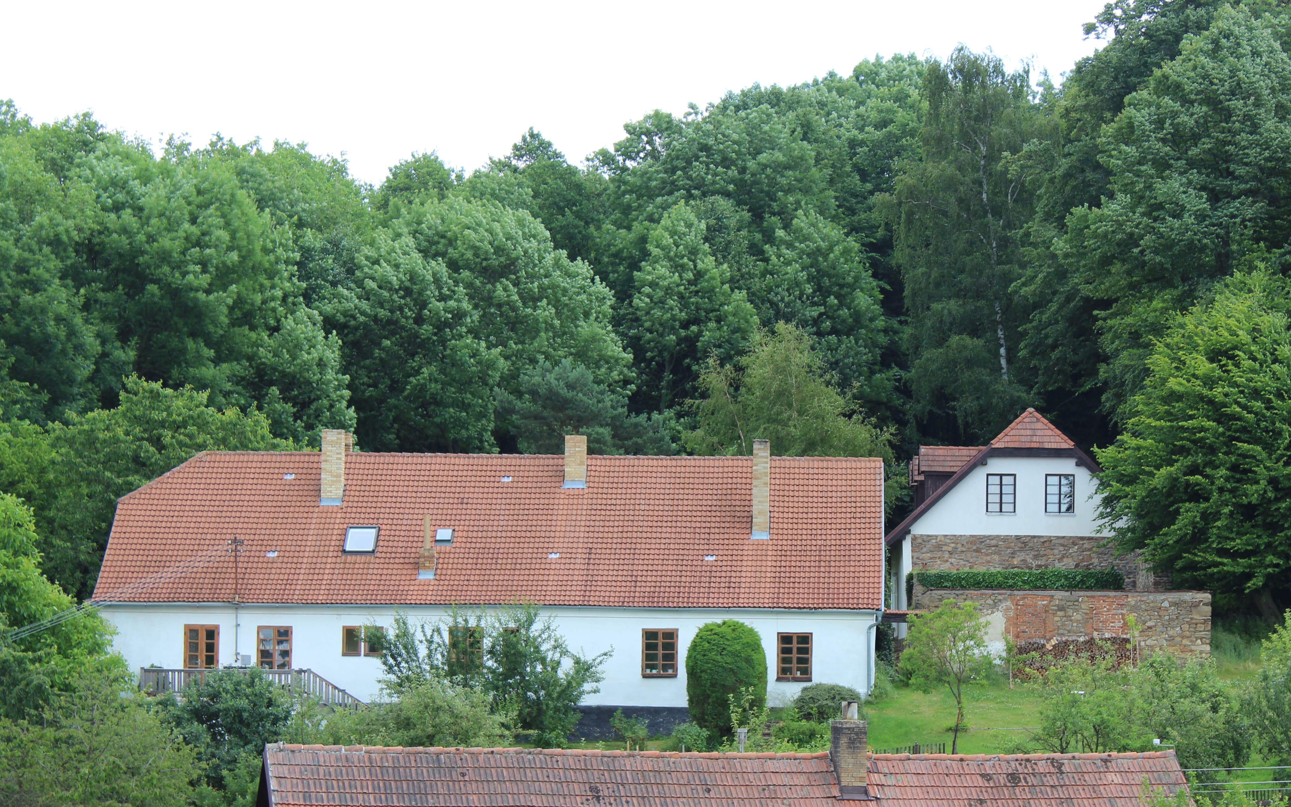 Dům evidenční číslo 14 v Růžkově Lhotici (pohled od západu).